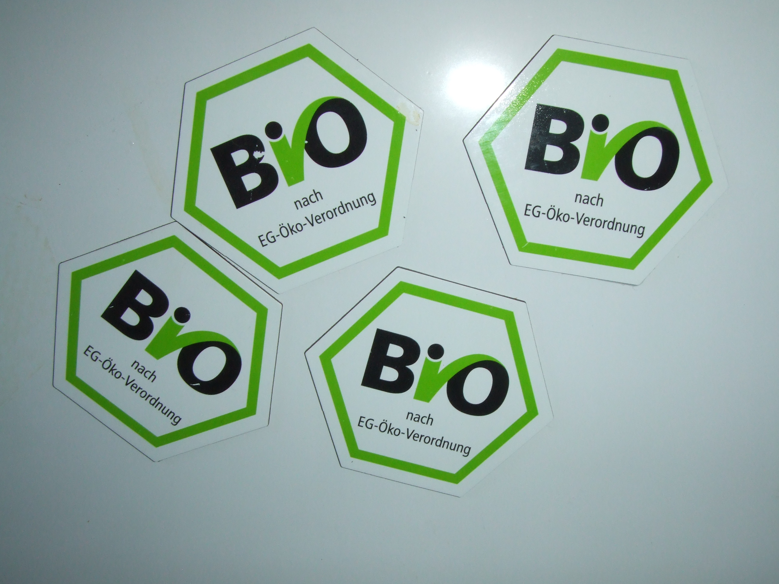 Bio-Siegel (Deutschland), Kühlschrankmagnete